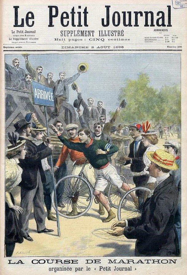 Le Petit Journal supplément illustré, 2 août 1896.